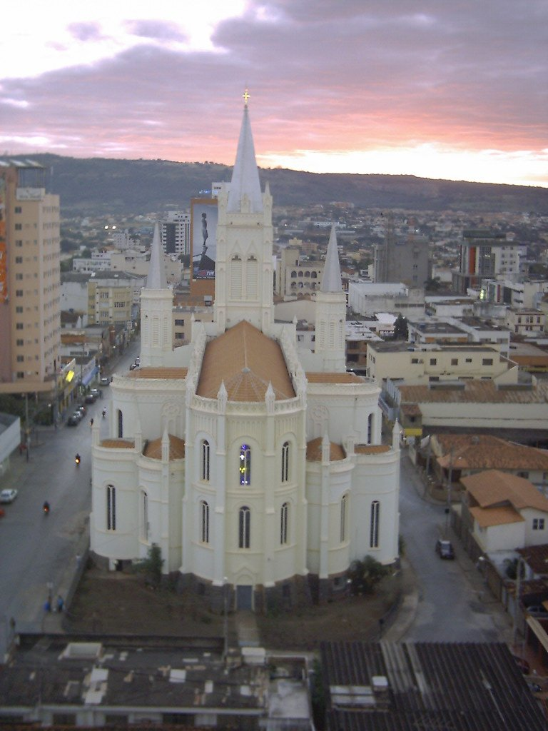 Matriz de Montes Claros - MG